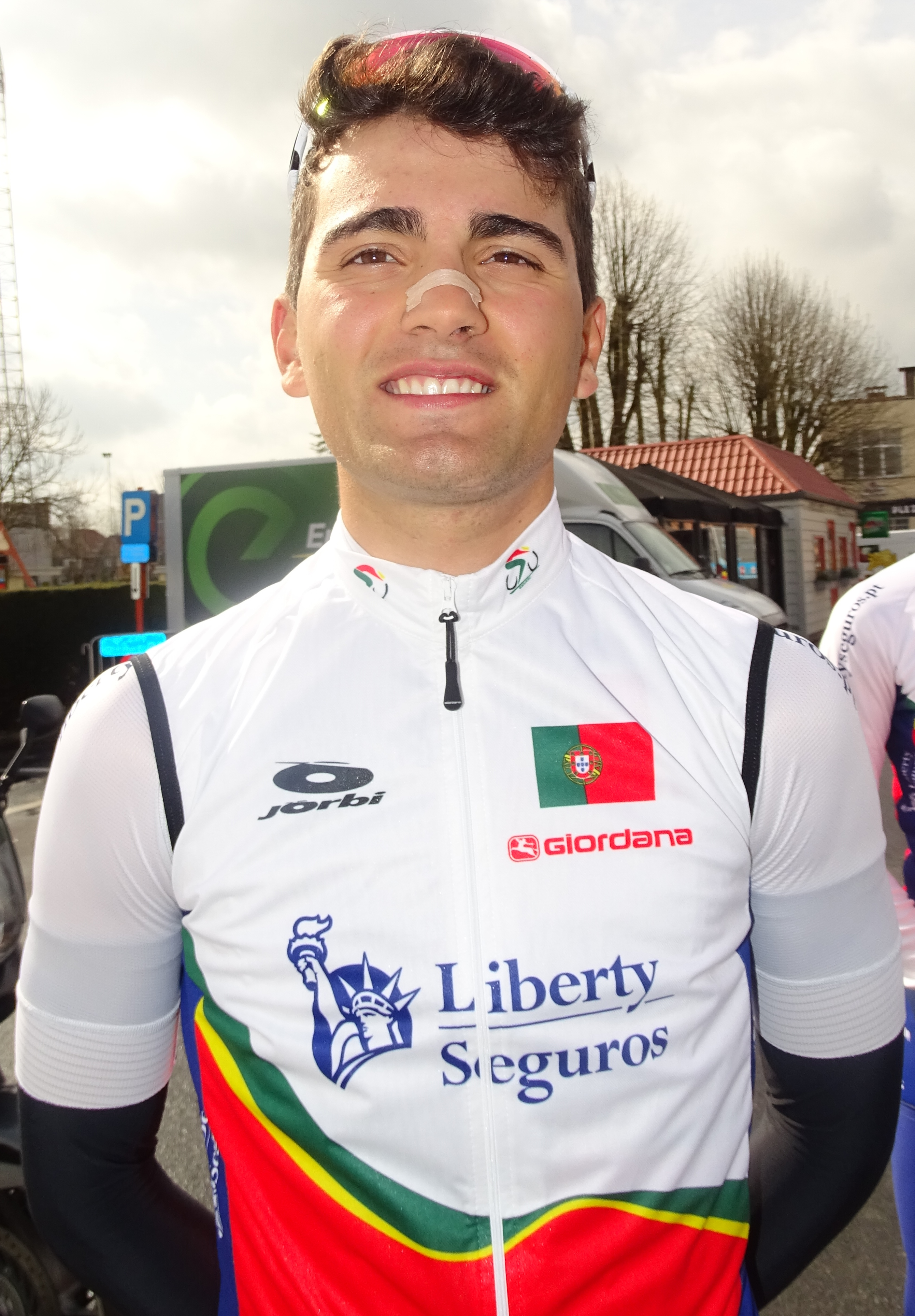 Reportage réalisé le samedi 11 avril à l'occasion du départ et de l'arrivée du Tour des Flandres espoirs 2015 à Audenarde, Belgique.